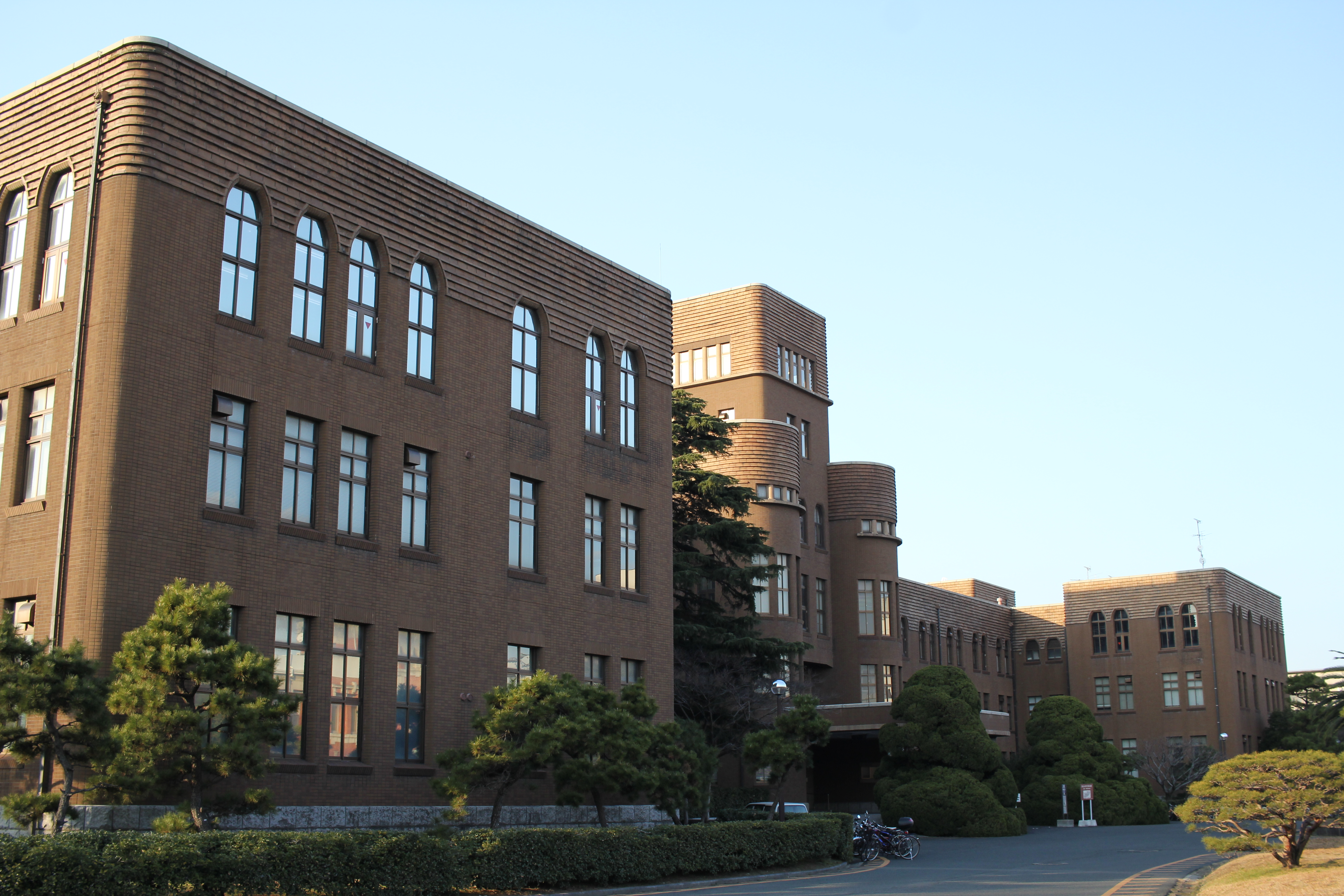 九州大学 旧工学部本館（箱崎地区）Canon EOS 60D